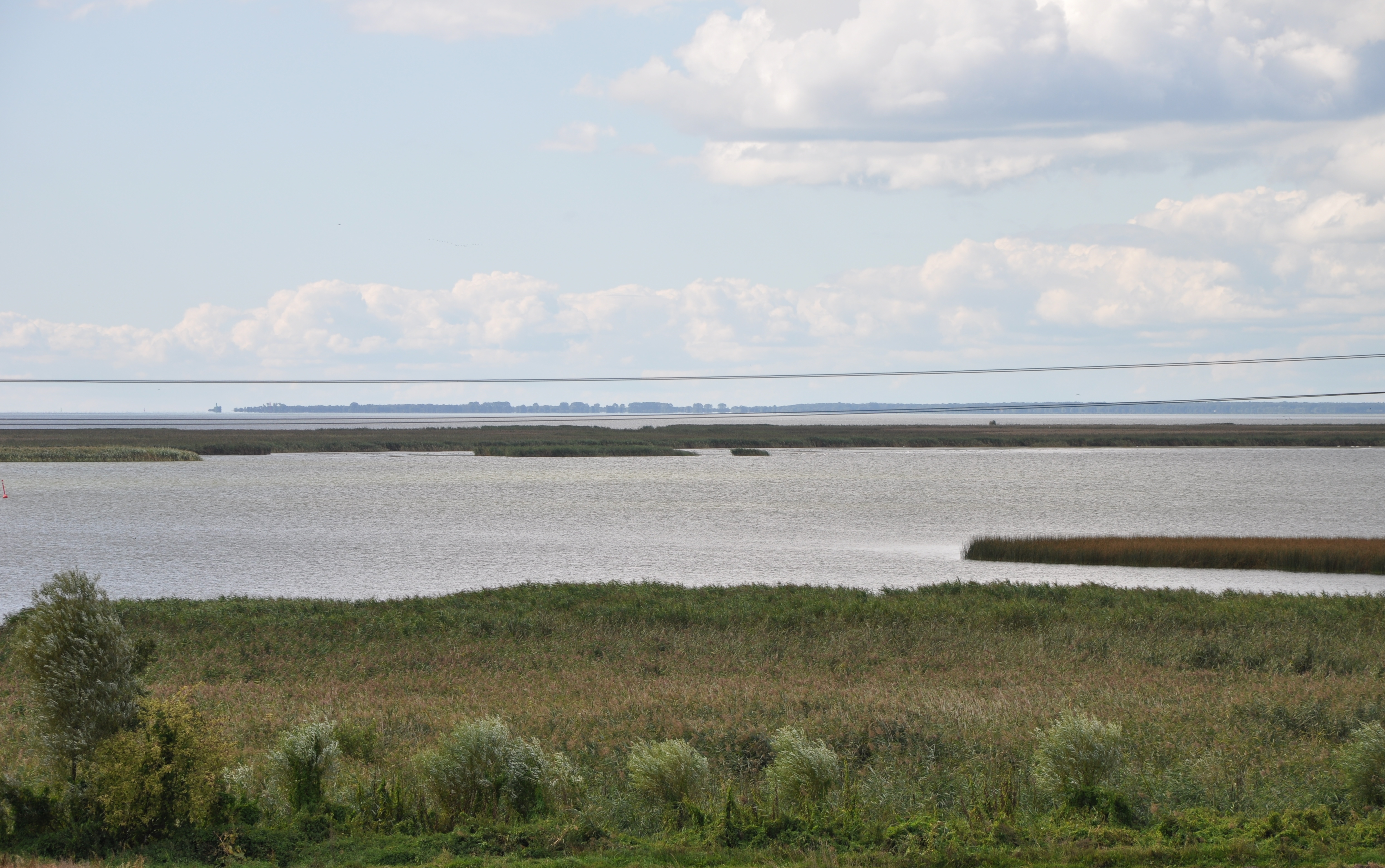 Głęboki Nurt - cieśnina przechodząca w Dziwnę